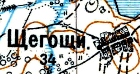 Топографическая карта Ленинградской области, квадрат Vc-29 (Батецкая), деревня Щегоща